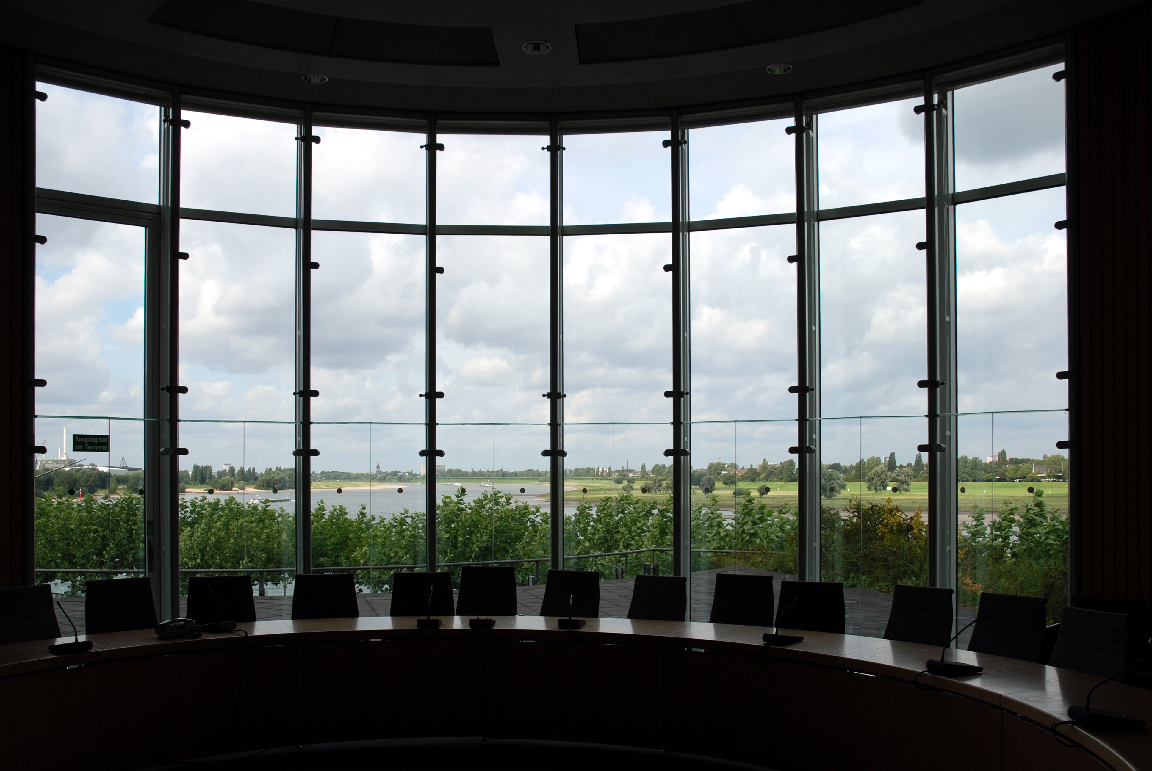 Düsseldorf, Landtag, Saal für Ausschüsse